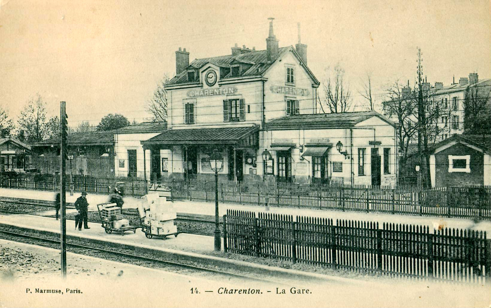 Carte postale ancienne éditée par Marmuse à Paris, n°14 : CHARENTON - La Gare